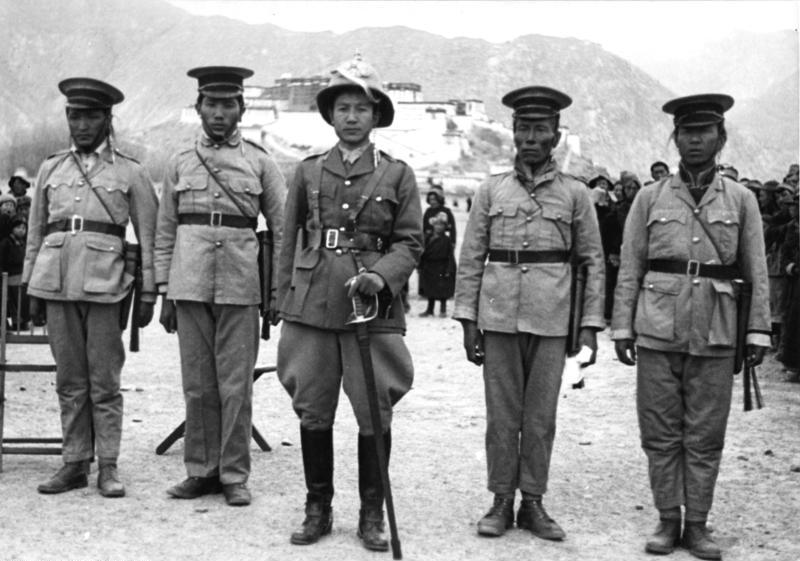 Lhasa, die Neujahrsparade des modernen Militärs vor dem Potala, Soldaten